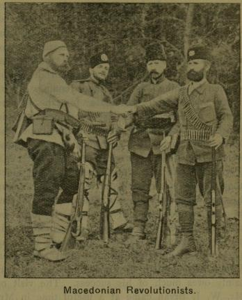 Алфред Хейлс, Борис Тагеев, Стефан Николов и Иван Цончев.